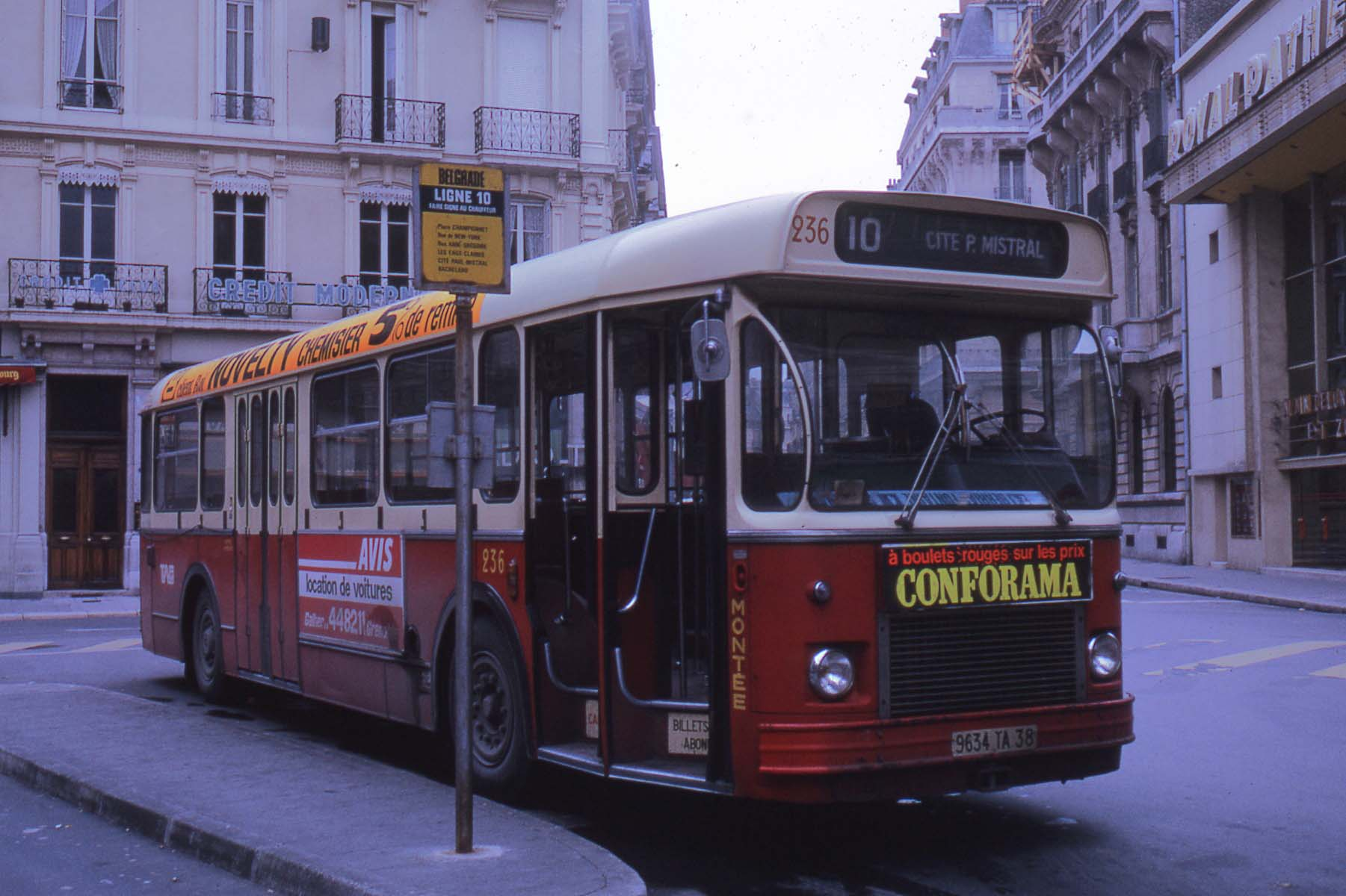 Un autobus Saviem SC 10-U à Grenoble, rue de Belgrade en 1975.